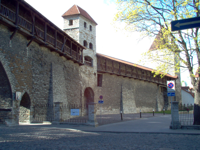 Tallinna vanalinna müür, Suur-Kloostri värav